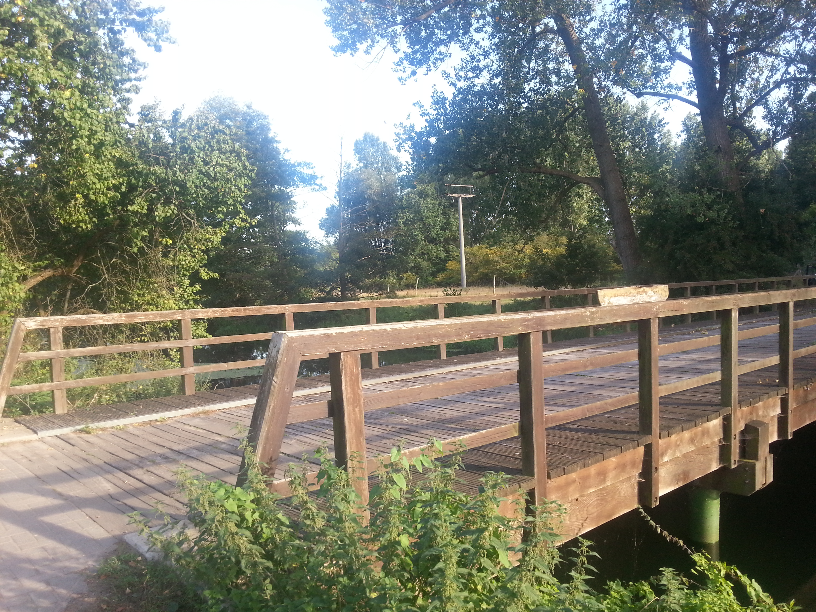 2. Perspektive KBIMB